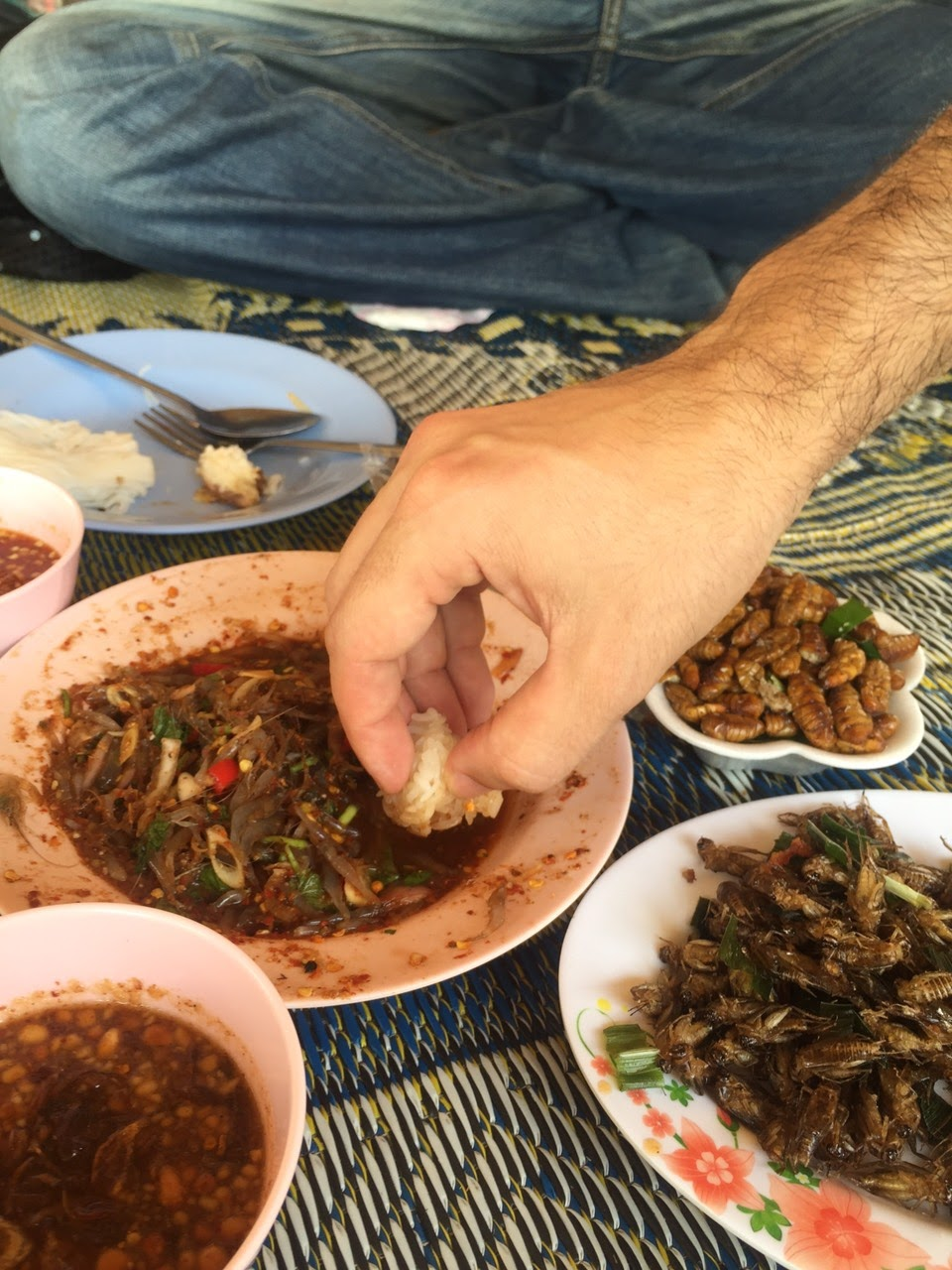 Goong Ten (Dancing Shrimp Salad) (Thai:กุ้งเต้น) - салат з танцючих креветок